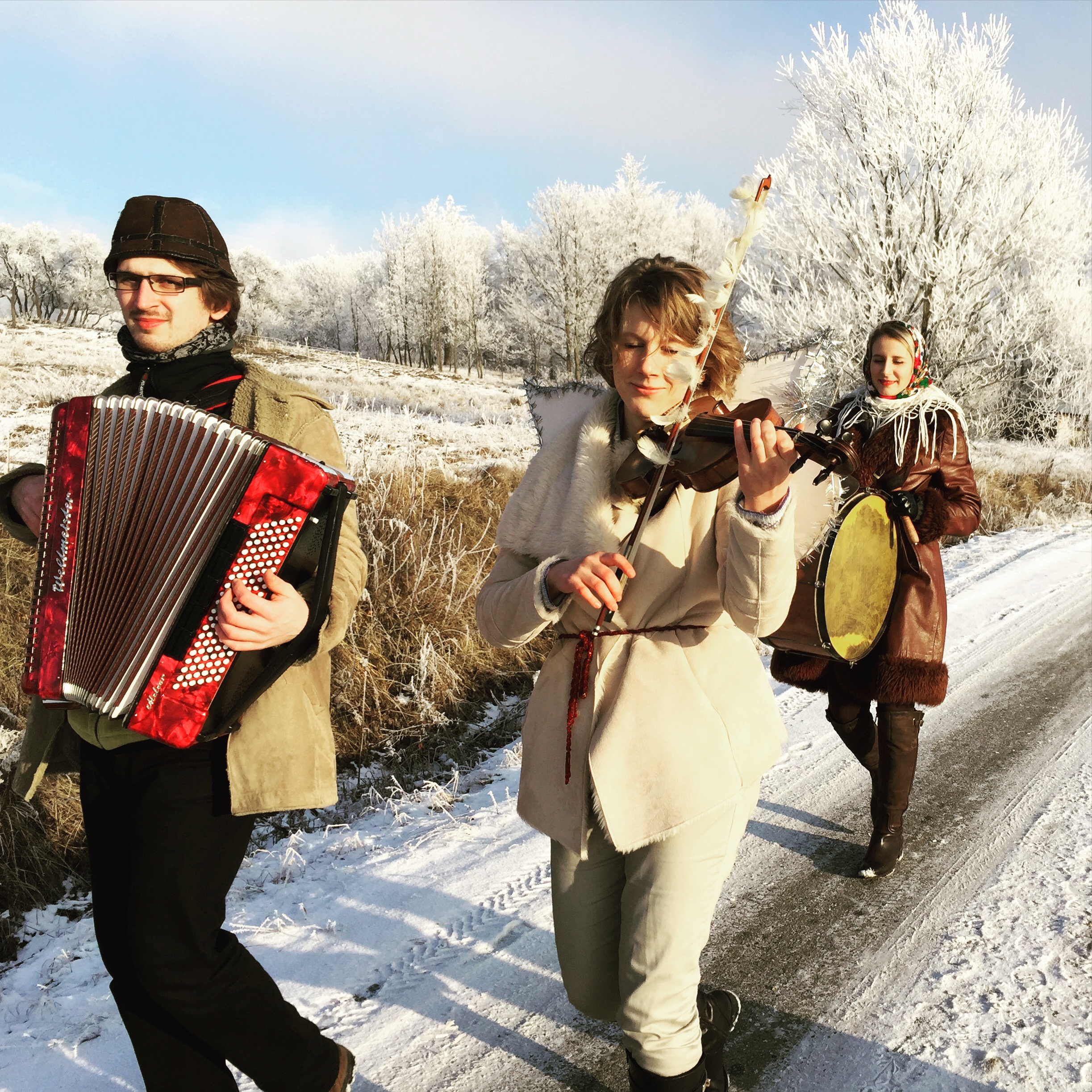 Zdjęcie z kolędowania zorganizowanego przez Zjednoczenie Łemków na terenie wsi Nowica i Bielanka w 2016 roku